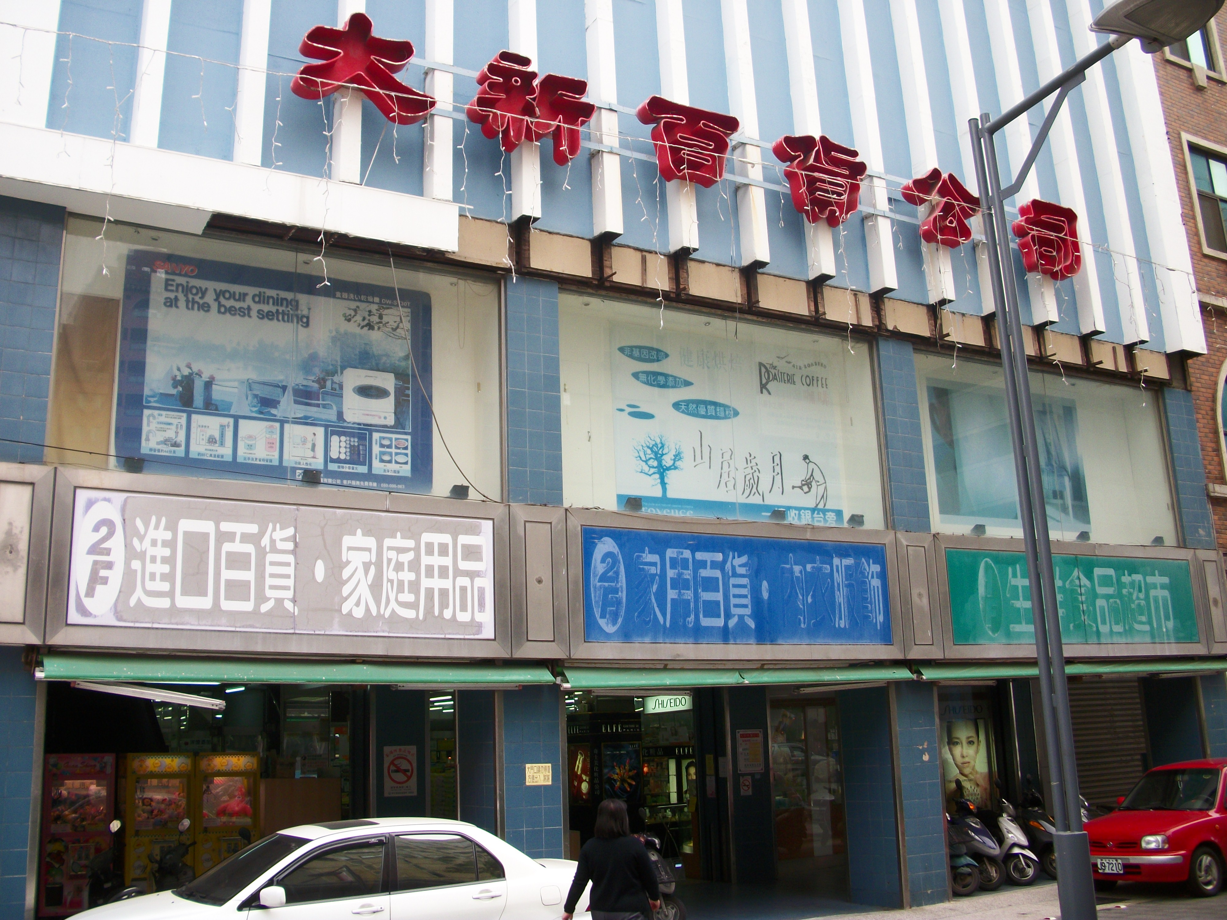 中文（台灣）: 高雄市大新百貨